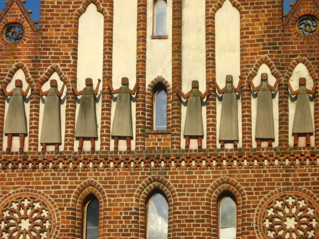 Das Neue Tor in Neubrandenburg. Die Stadtseite des Haupttorturmes ist mit acht Terrakottafiguren, den sog. „Adorantinnen“, geschmückt. Über die Bedeutung dieser Adorantinnen ist nichts Verbürgtes bekannt.